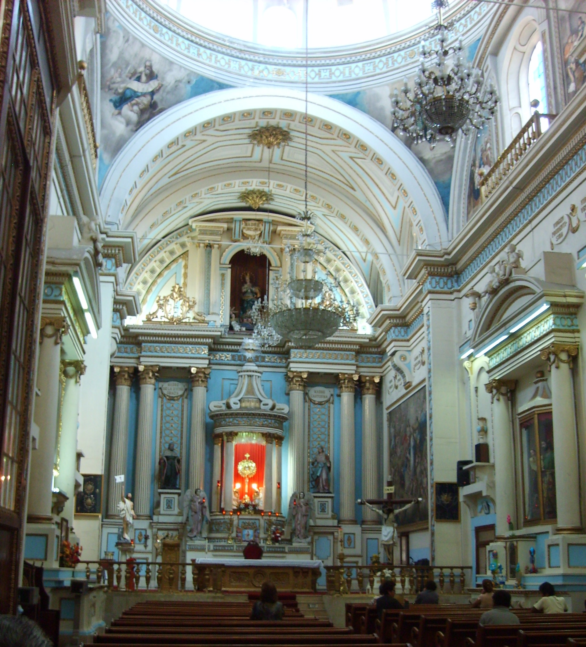 Templo de la Limpia Concepción en Puebla, México